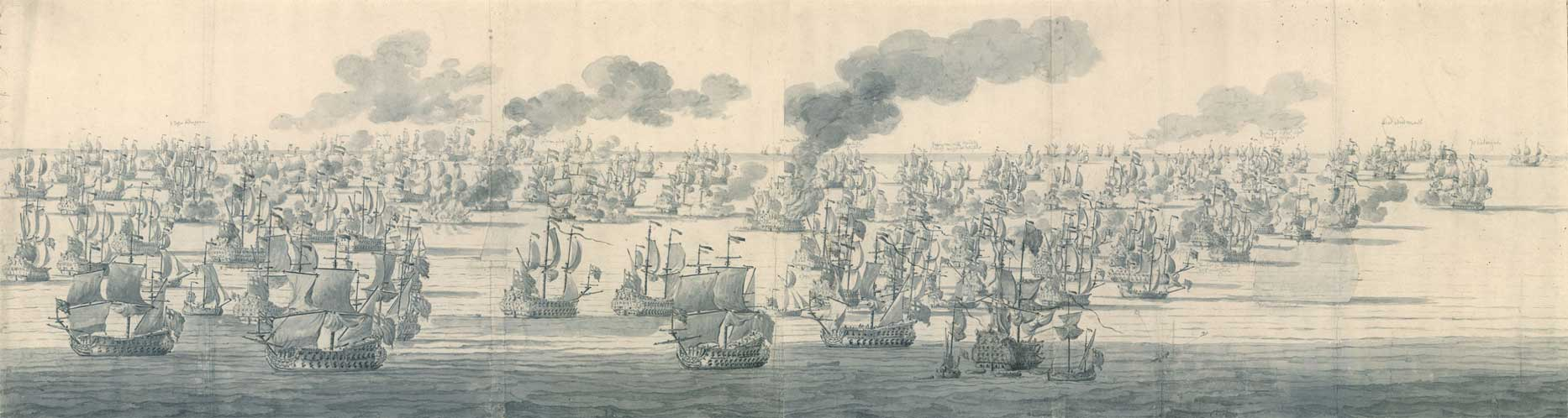 The Battle of Solebay, 7 June 1672.label QS:Len,"The Battle of Solebay, 7 June 1672." label QS:Lnl,"De slag bij Solebay, 7 juni 1672." Alternative title(s): De Slag bij Solebay, 7 juni 1672, even na twee uur in de middag, gezien vanuit het noordwesten.